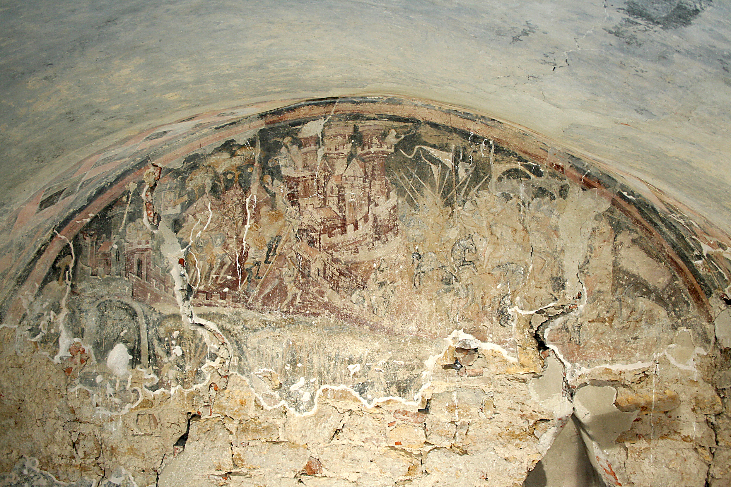 Pistorkaserne